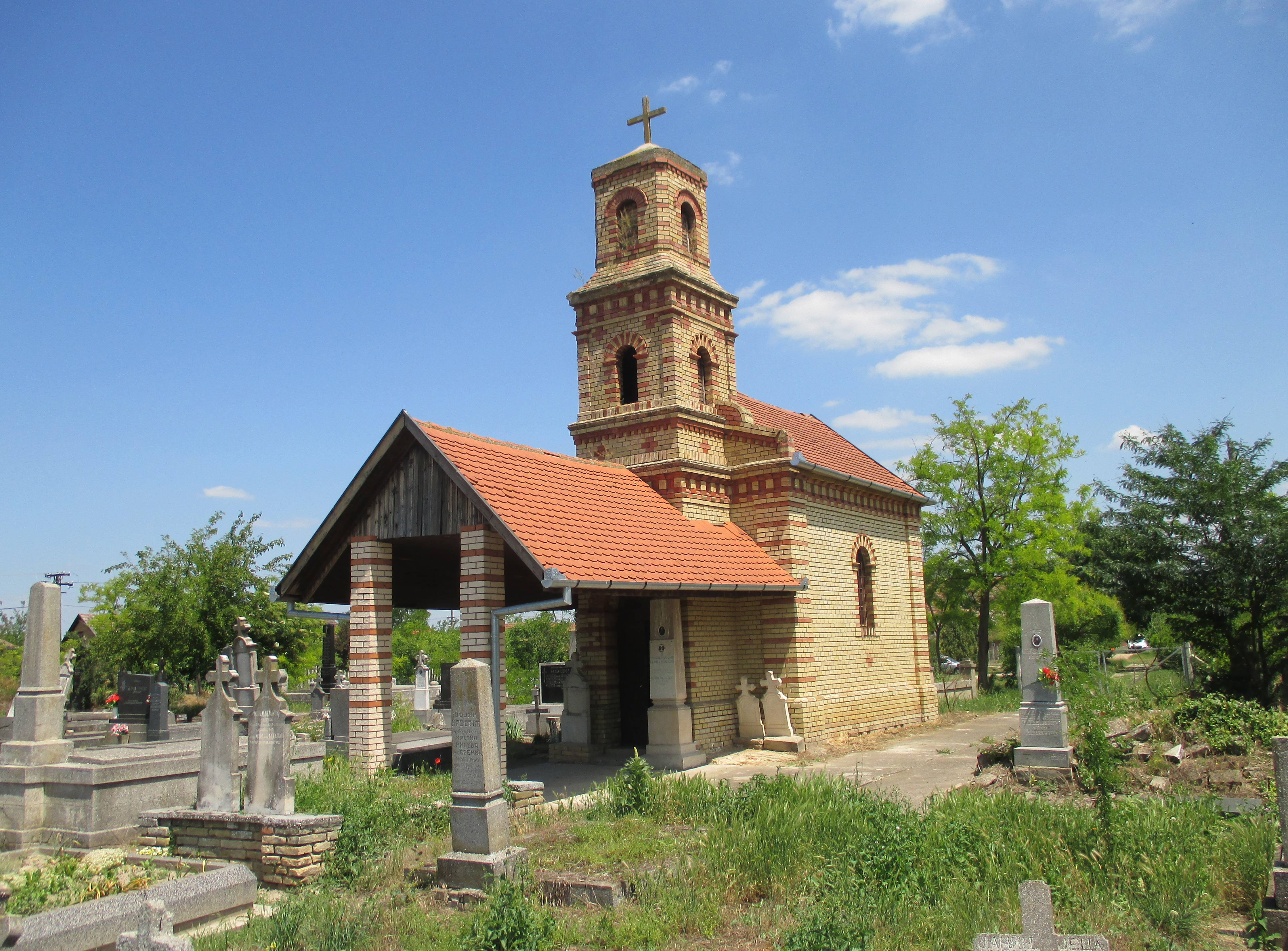 Upisano nepokretno kulturno dobro - SK 1811